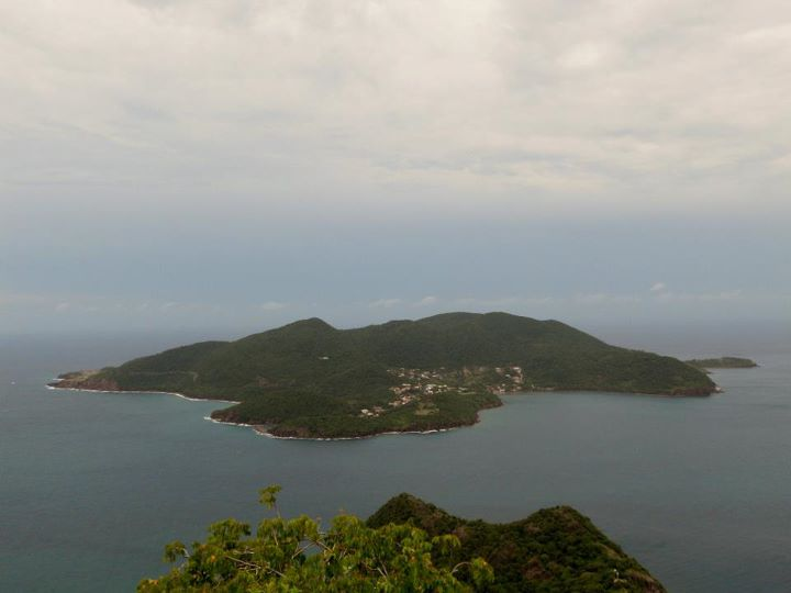 Terre-de-Bas Iles des Saintes Antilles Françaises